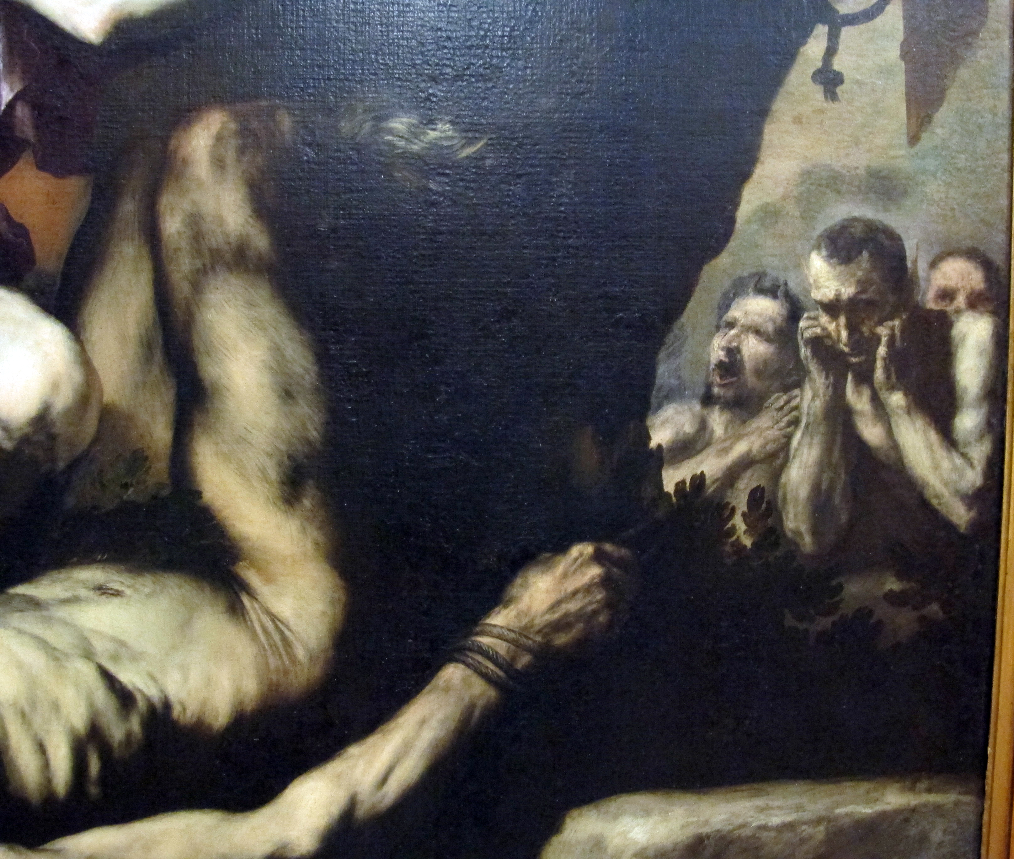 Galleria Napoletana (Museo di Capodimonte)